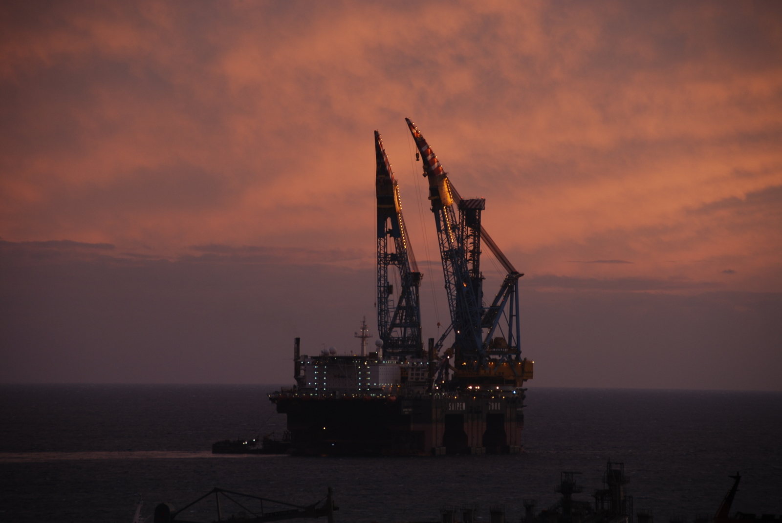 El Saipem 7000 es la segunda grua maritima más grande del mundo. Actualmente está en Almeria construyendo el gasoducto de Medgaz que ha de traernos gas natural desde Argelia.